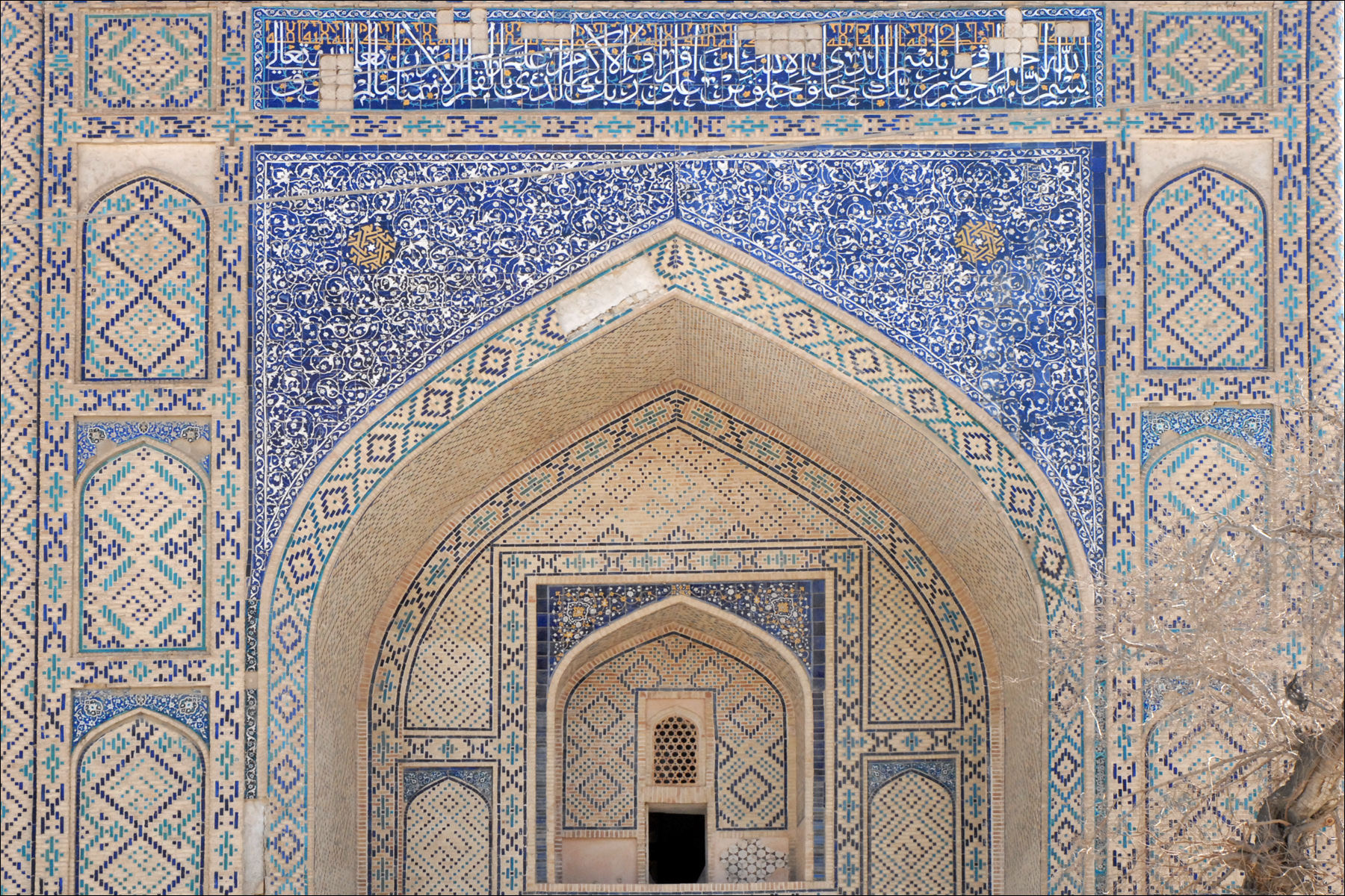 Le portique de la médersa Modar-i-Khan. La médersa Modar-i-Khan a été construite en 1567 en l'honneur de la mère d'Abdoullah Khan II. Elle appartient à l'ensemble architectural appelé "Koch Madrassah" ou "les deux médersas" d'Abdullah Khan (1533-1597), un khan cheïbanide qui fut un grand bâtisseur de Boukhara.